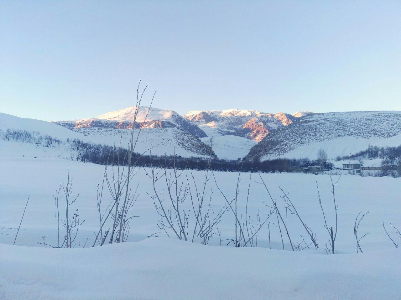 بیران شهر